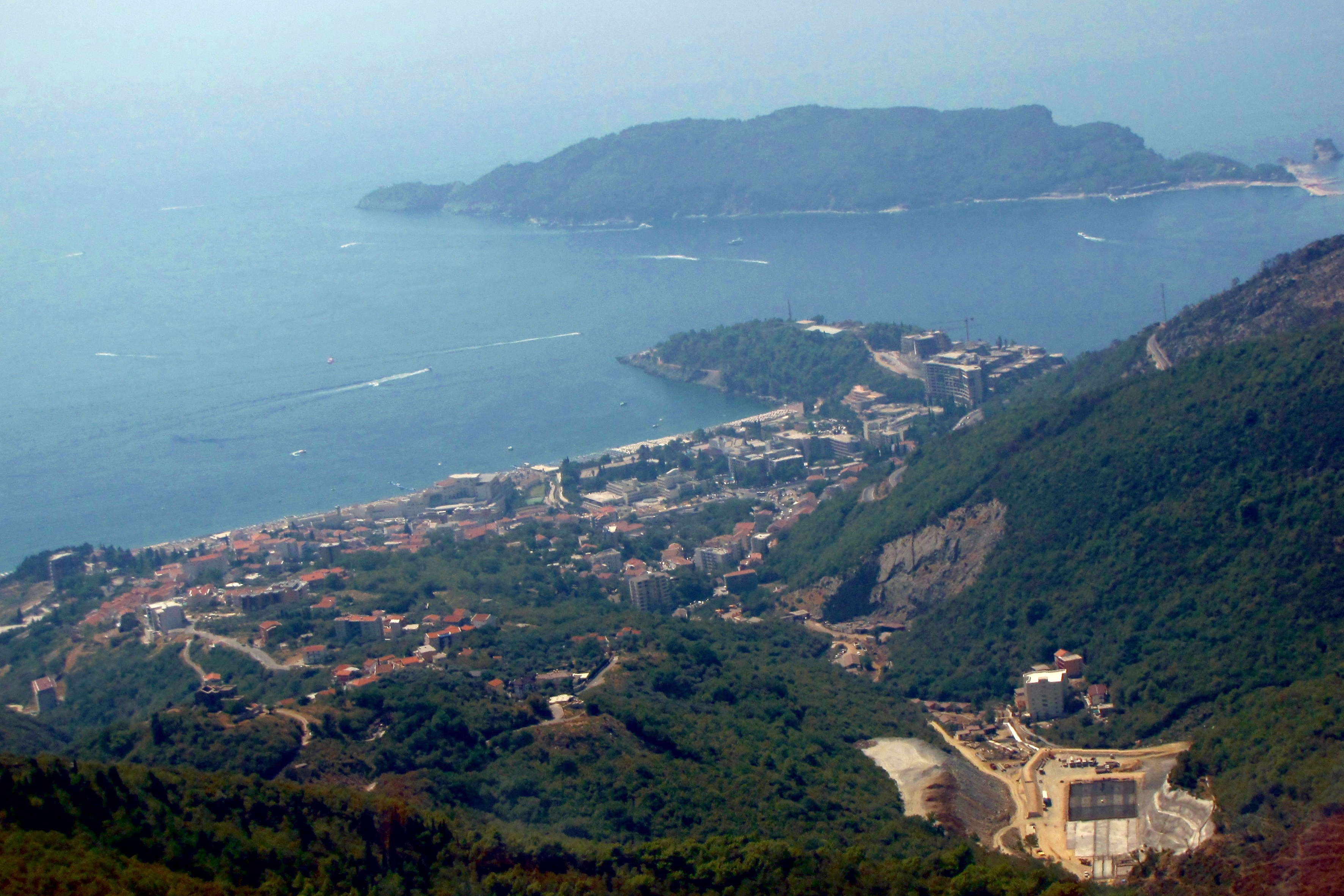 Budva-Becici. Вид на остров Святого Николы